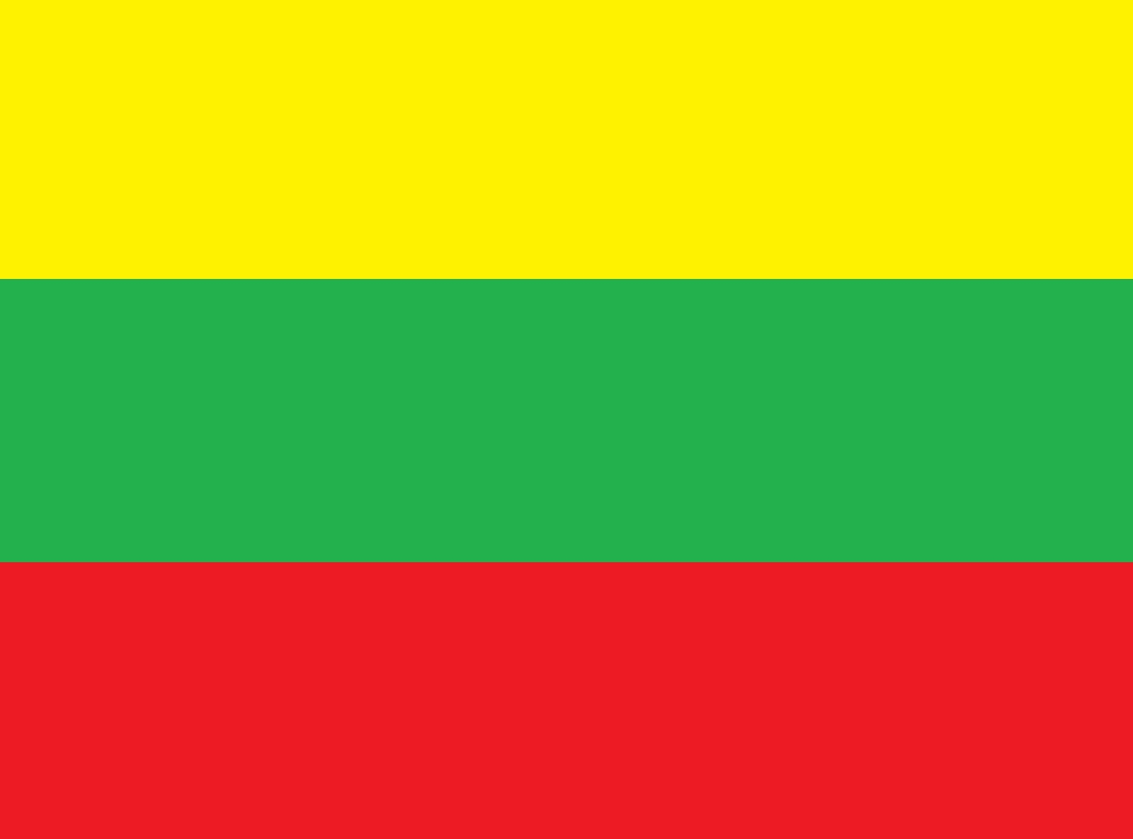 de venezuela para el mundo